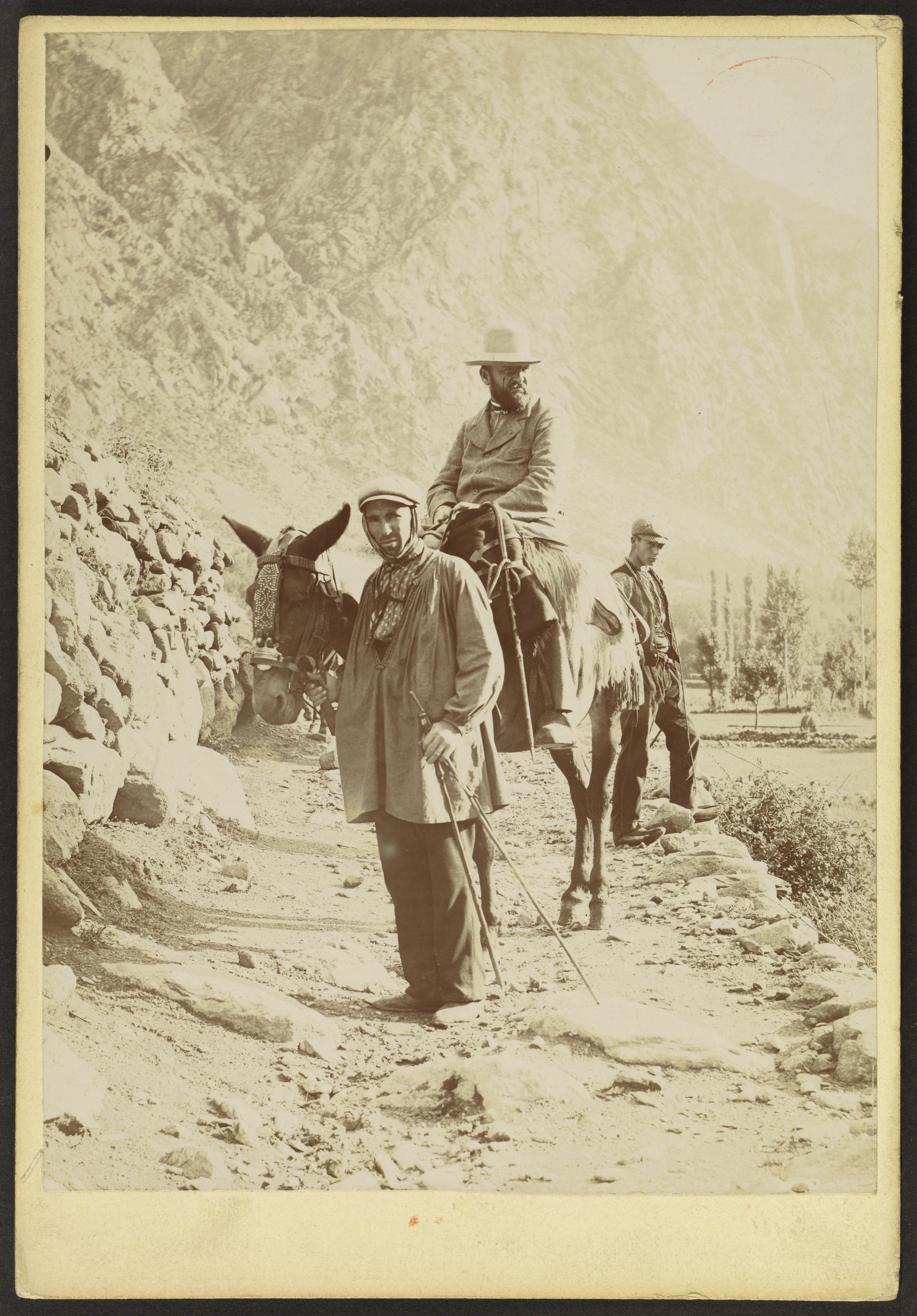 M. Jullian